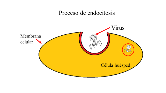 Proceso de endocitosis aprovechado por el agente infeccioso para atravesar la membrana de la célula. Este paso es denominado penetración.